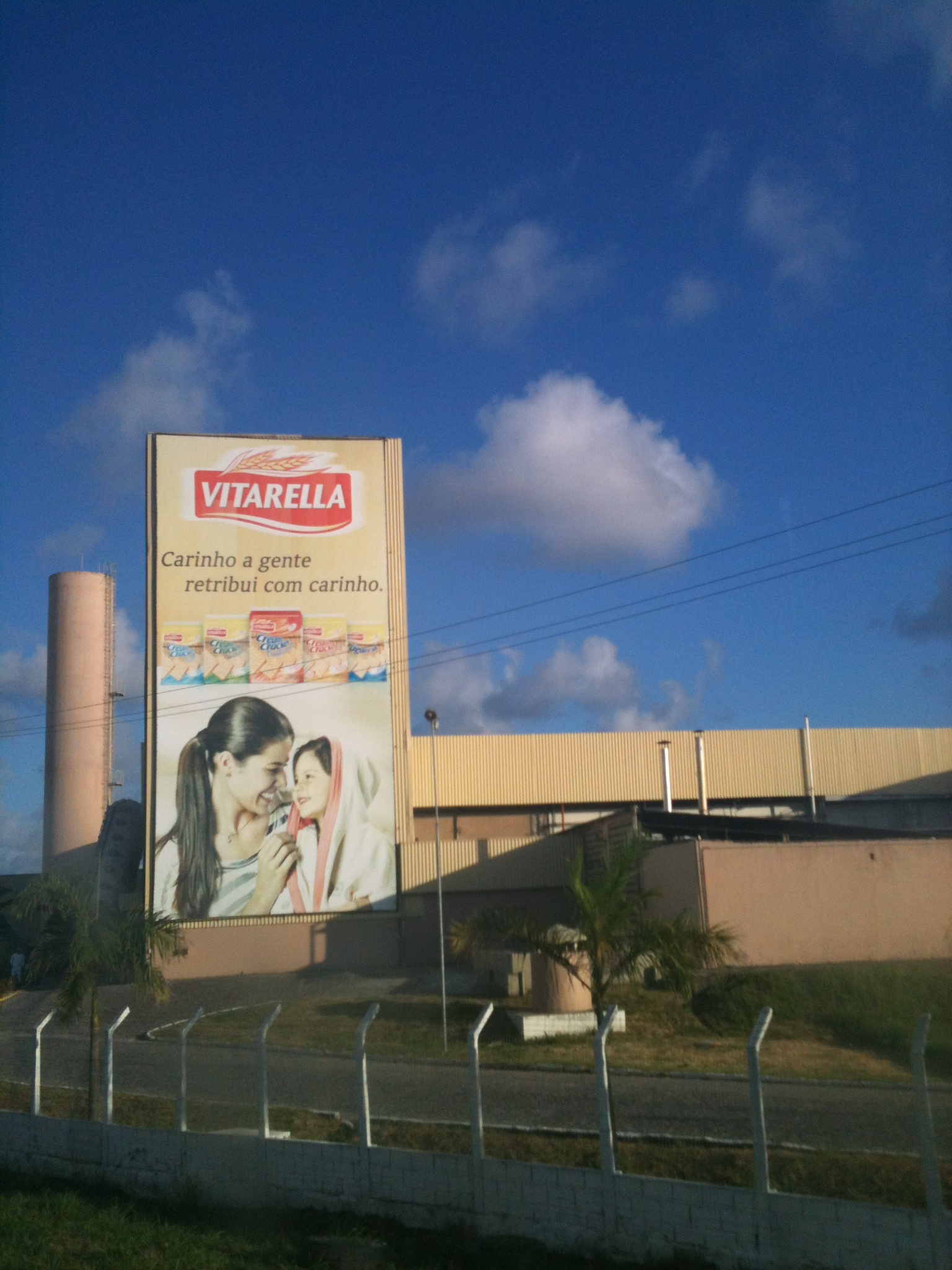 Vitarella